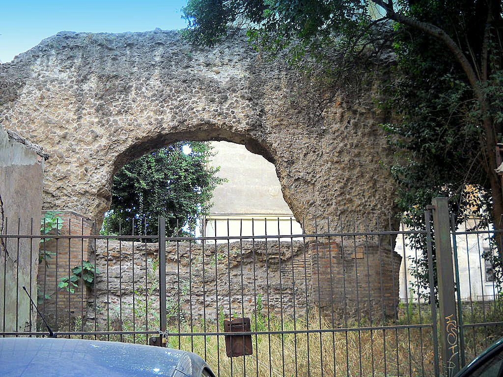 Ruderi della Porticus Aemilia in via Rubattino